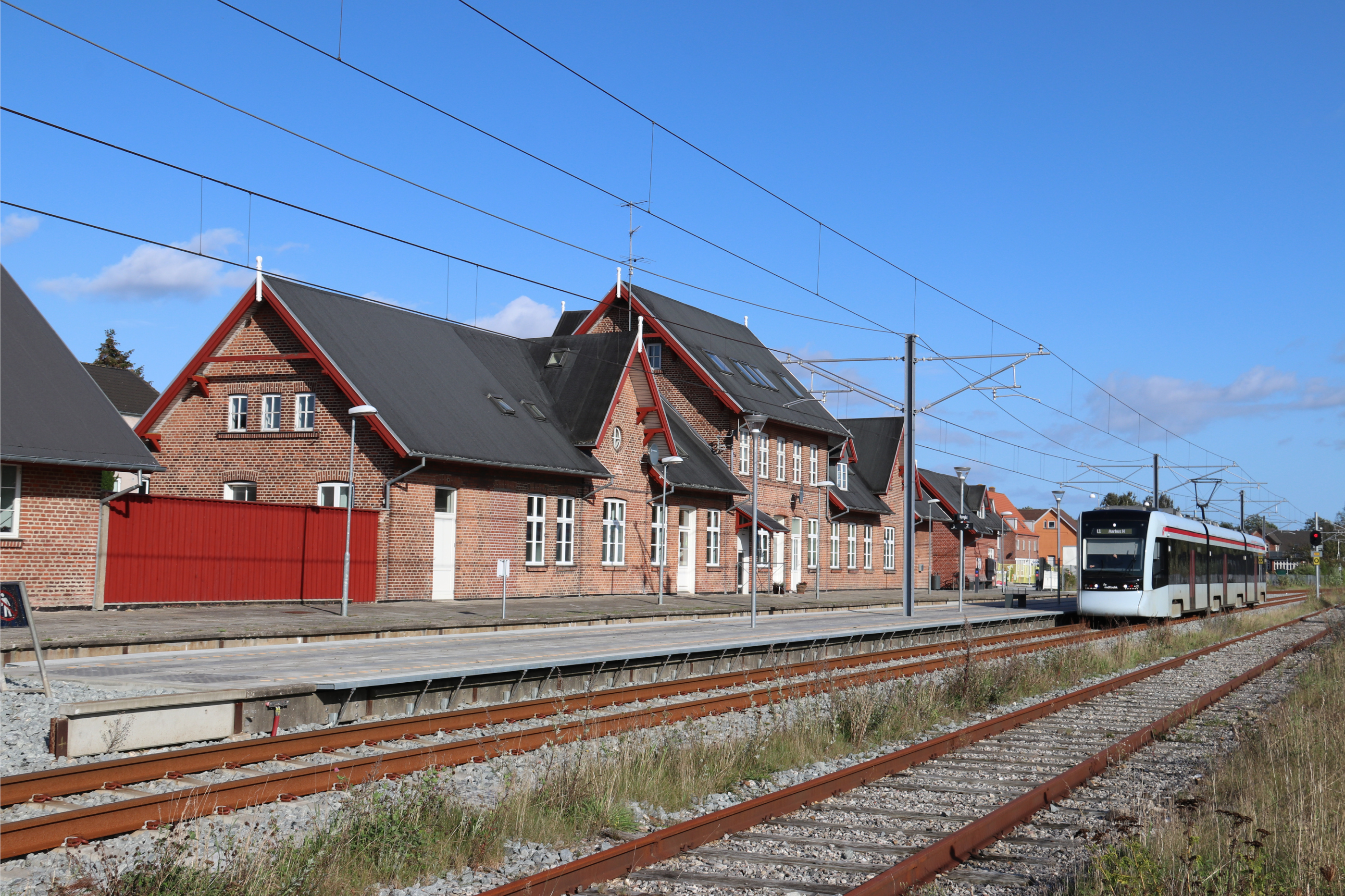 Ryomgård Bahnhof 2019